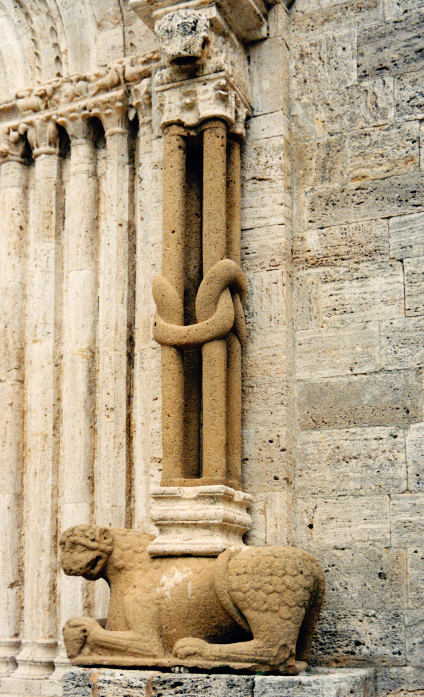 Italie - Toscane - Collégiale de San Quirico d'Orcia